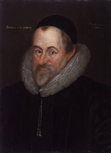 William Camden